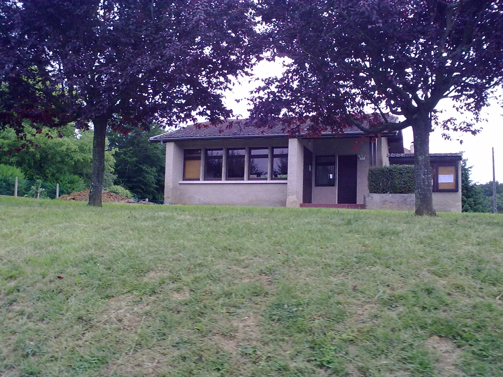 Séméacq-Blachon